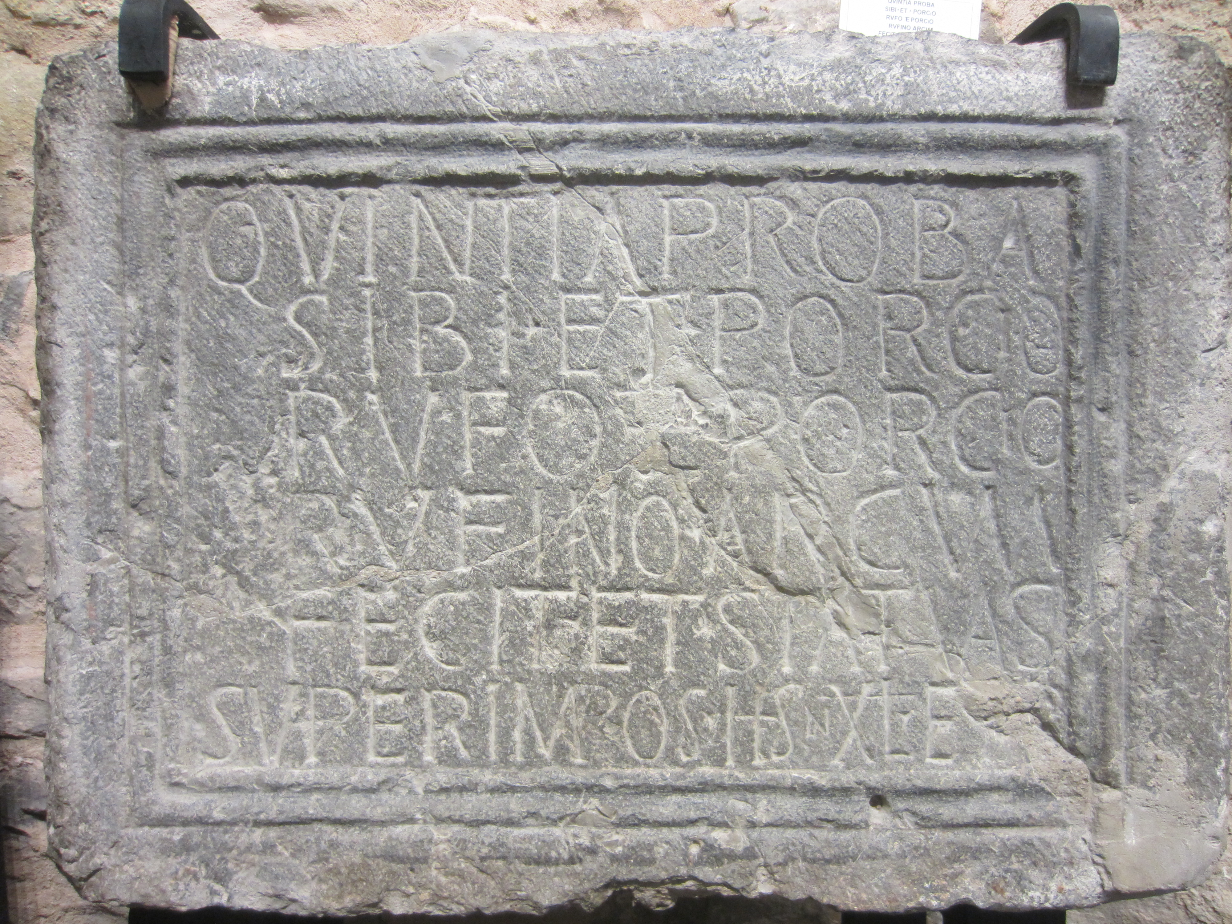 Inscripción romana perteneciente a la colección epigráfica de Jérica y conocida como Quintia Proba, ya que se cita la construcción de un arco con estatuas por parte dicha mujer